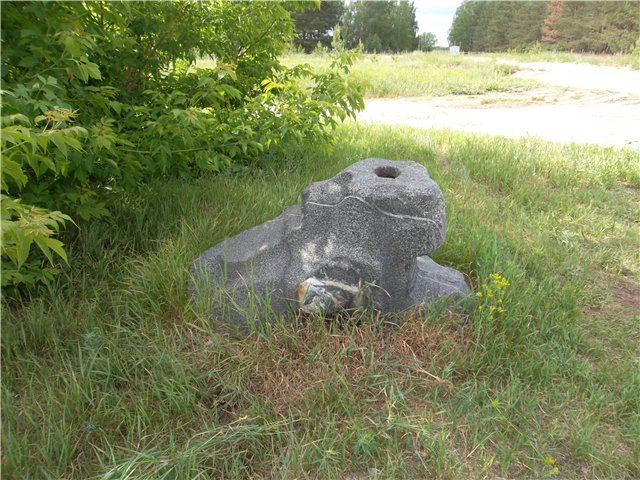 Надгробный камень с могилы Н.П.Гагарина